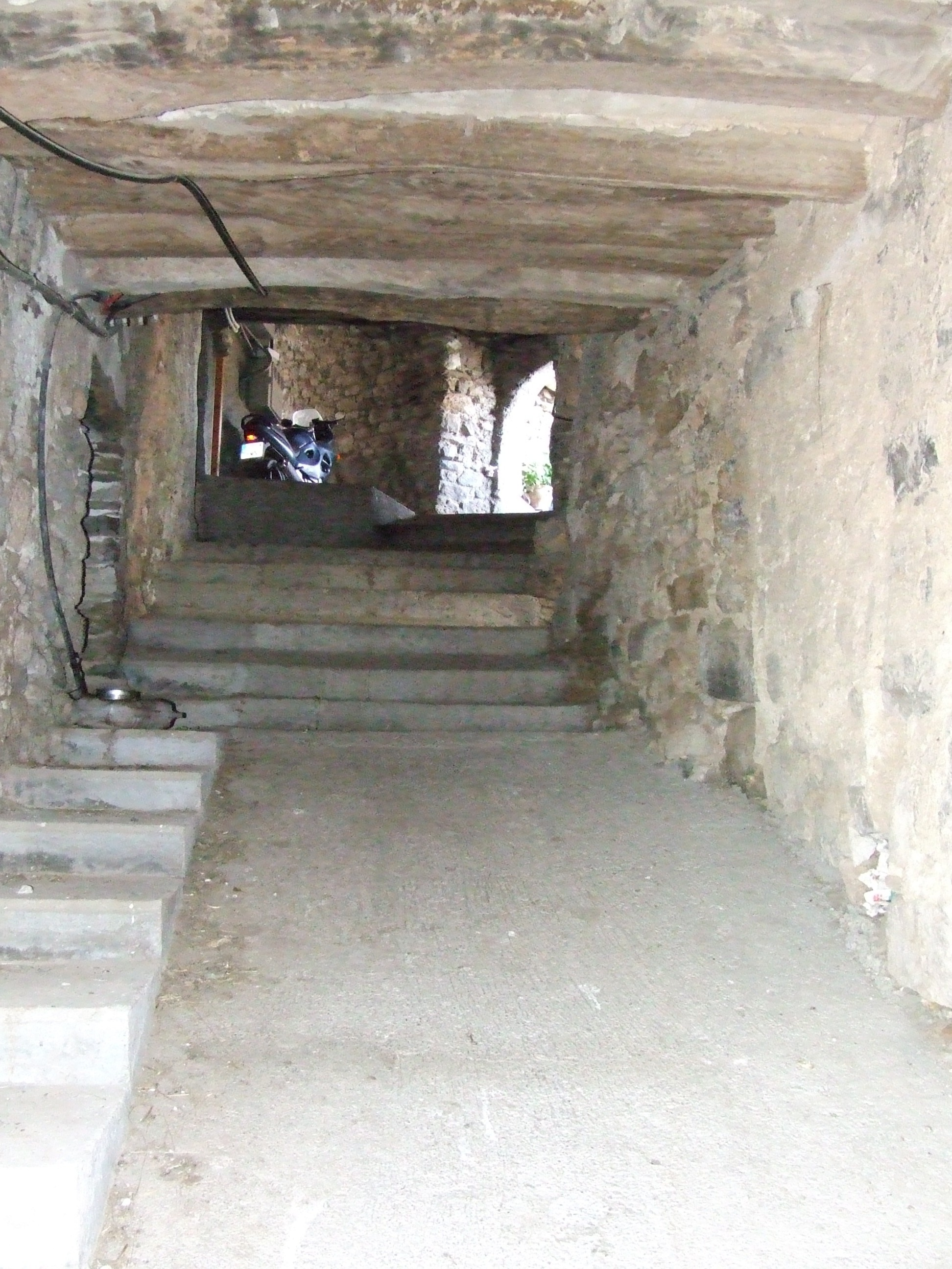 Carrer sota les cases de Vilella (Sarroca de Bellera, Pallars Jussà)